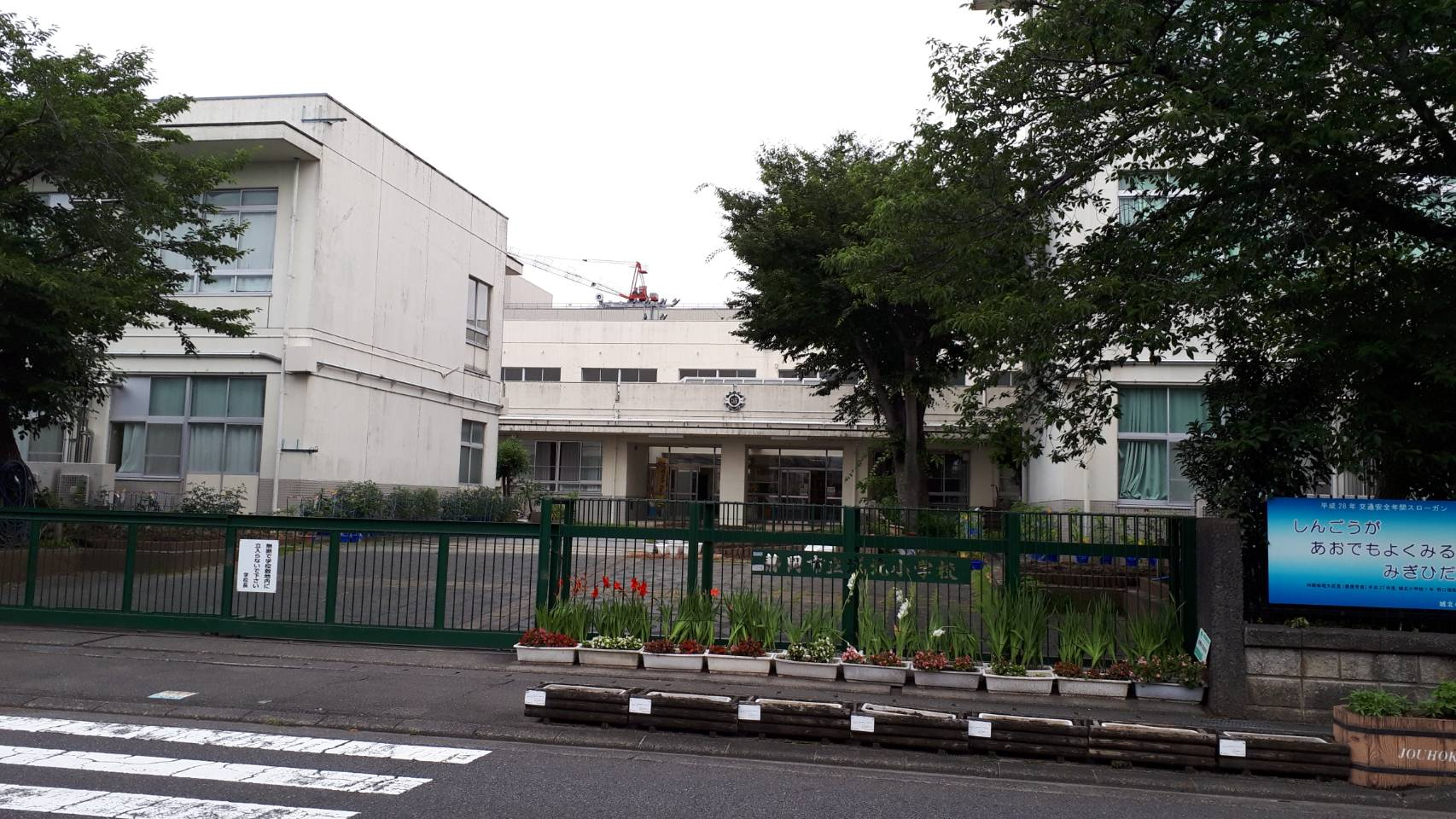 静岡県の小学校